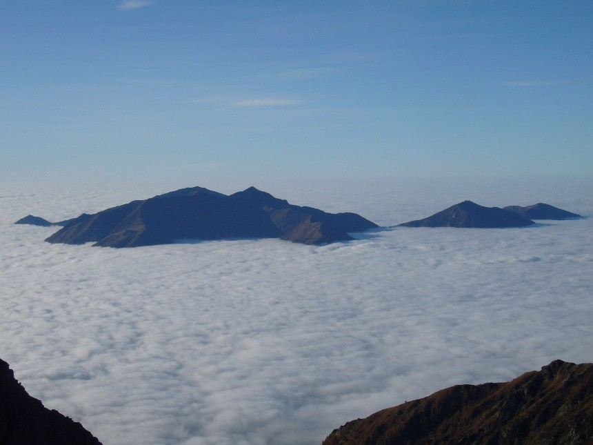 Monte Tamaro gegen Süden; der letzte Berg, welcher über den Herbstnebel der Po-Ebene ragt.